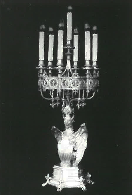 Świecznik z zastawy Kelchów wykonanej przez Faberge. Fot. z 1900 r.